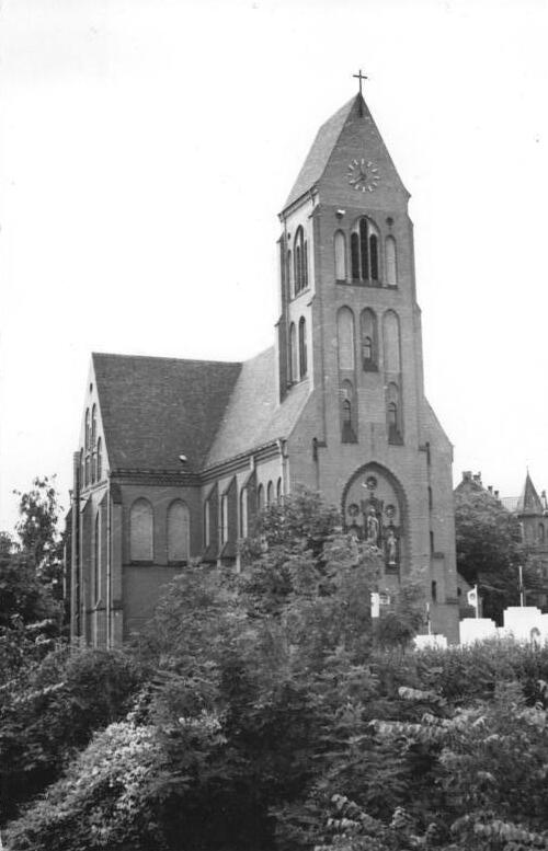 Rostock, Katholische Kirche, Schroder-Platz Zentralbild Klein - 5.8.1953 UBz: Die katholische Kirche am Schroder-Platz wurde im Kriege beschädigt und jetzt wieder instandgesetzt.